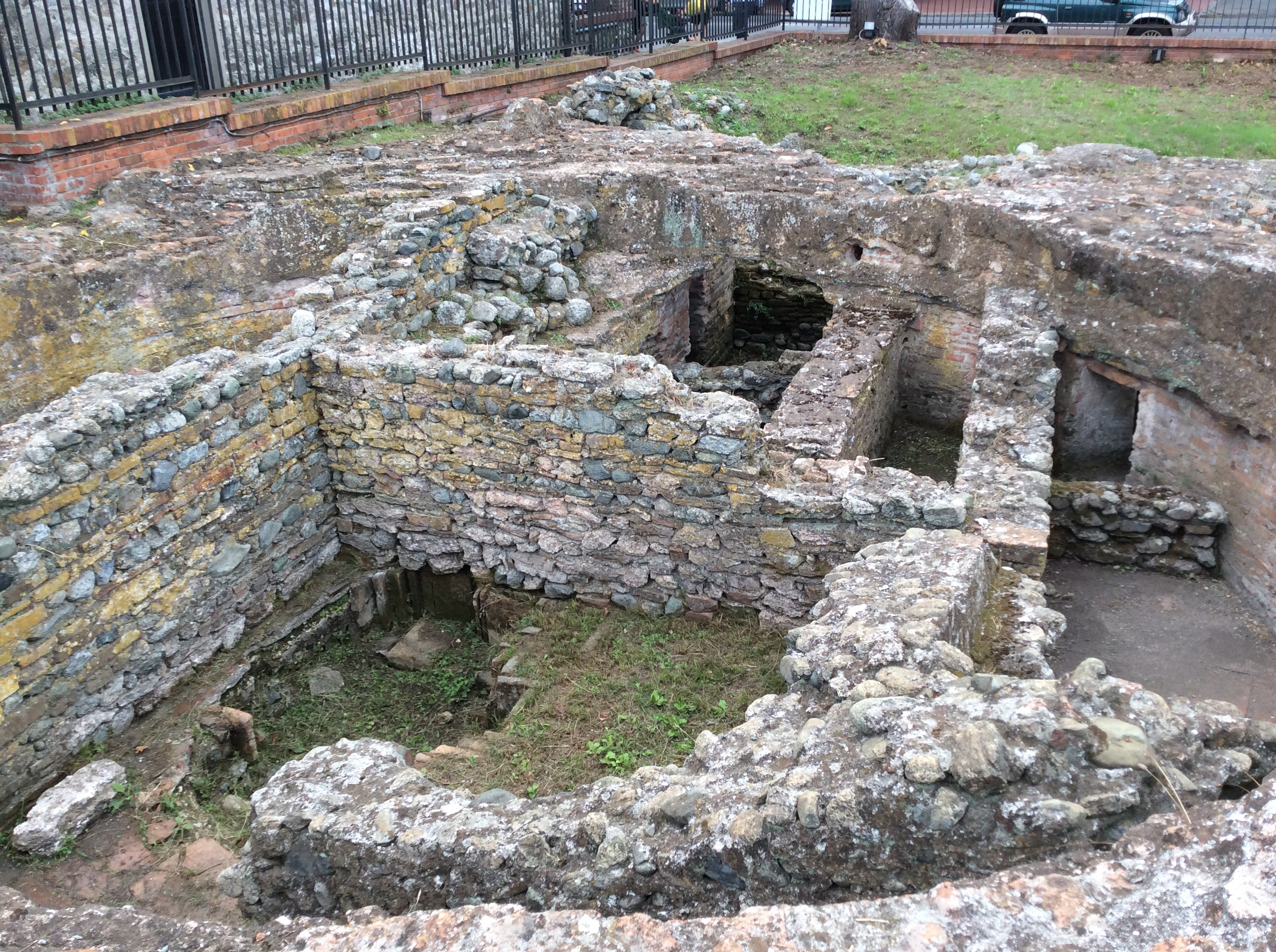 Villa romana di Alba Docilia - MIBAC This is a photo of a monument which is part of cultural heritage of Italy.